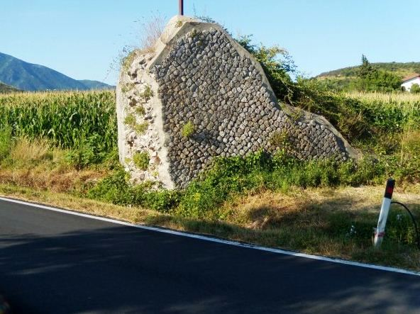 Ruderi di mura in "opus quasi reticulatum" nell'area archeologica di Telesia (provincia di Benevento).